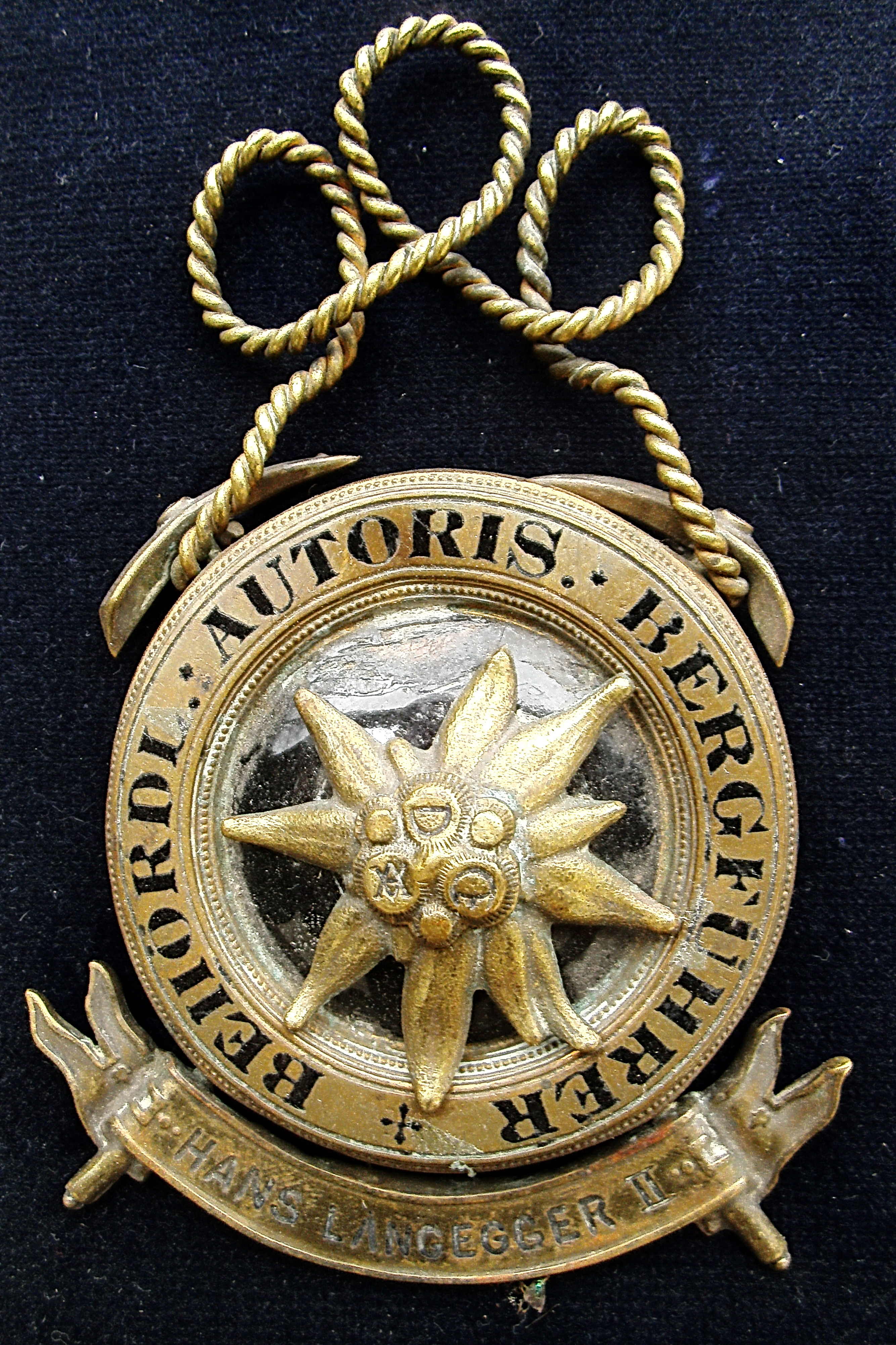 Anfängliches (ab 1885), sehr aufwendiges Abzeichen für einen behördlich autorisierten Bergführer des Deutsch-Österreichischen Alpenvereins